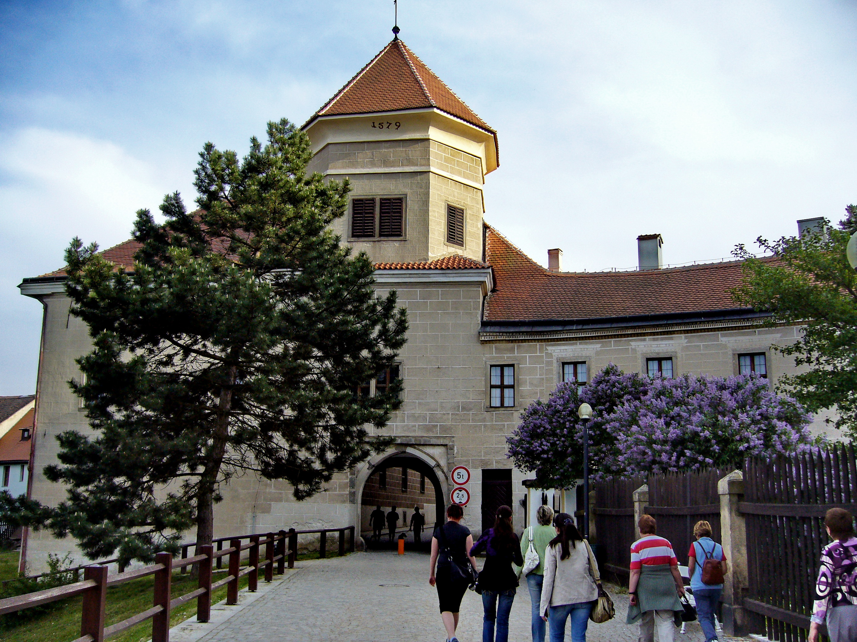 Телч, Чешская Республика